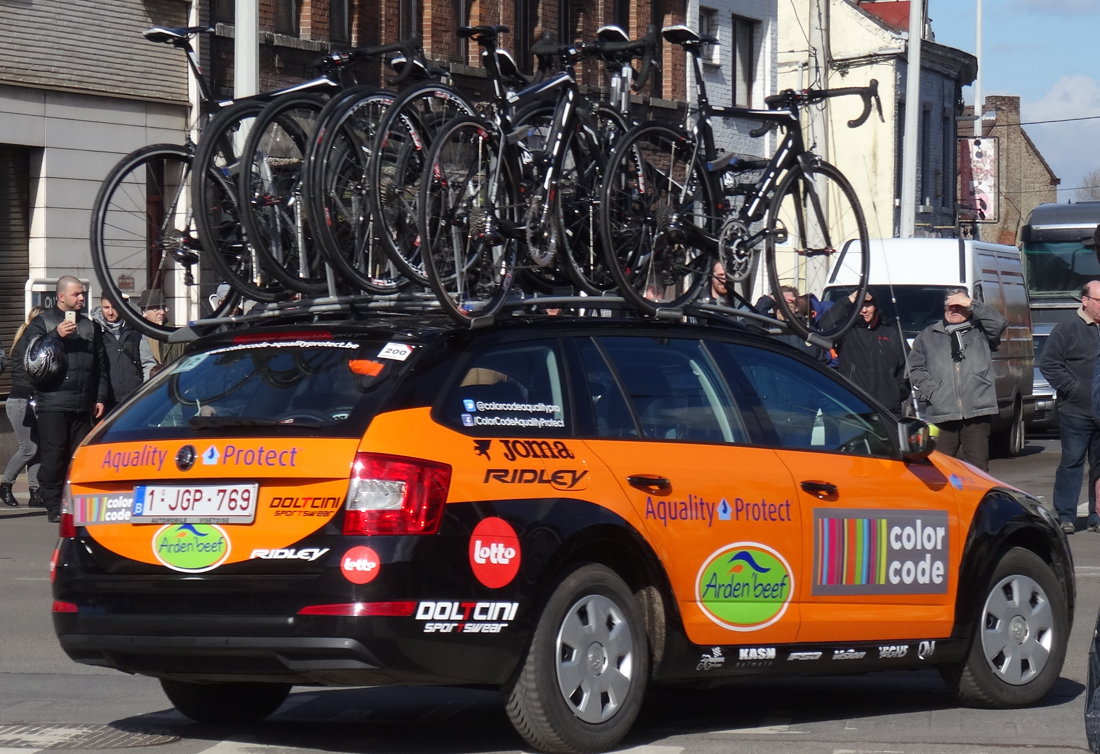 Reportage réalisé le mercredi 4 mars à l'occasion du départ du Samyn des Dames 2015 et du Samyn 2015 à Quaregnon, Belgique.